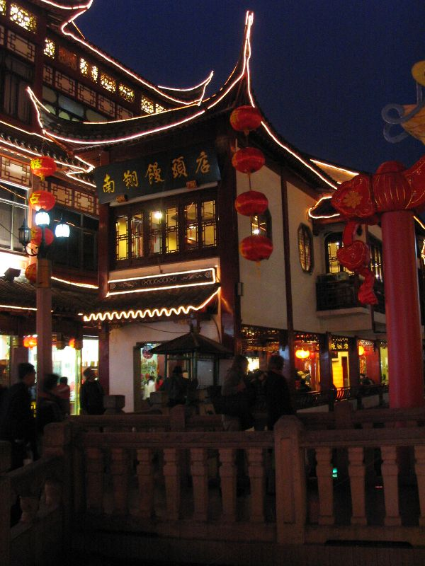 上海南翔饅頭店 Nanxian Mantou Dian at Yuyuan Garden